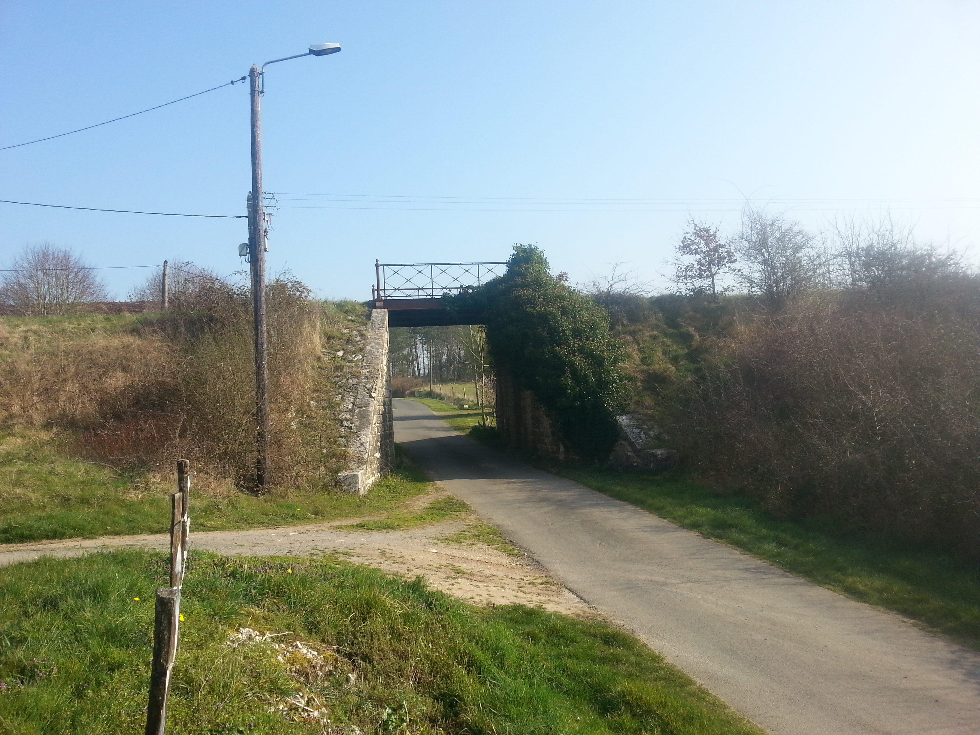 Le pont des Cloîtres de la branche de Tournon-Saint-Martin au Blanc de la voie verte des Vallées, au lieu-dit Les Cloîtres, à Fontgombault (36).